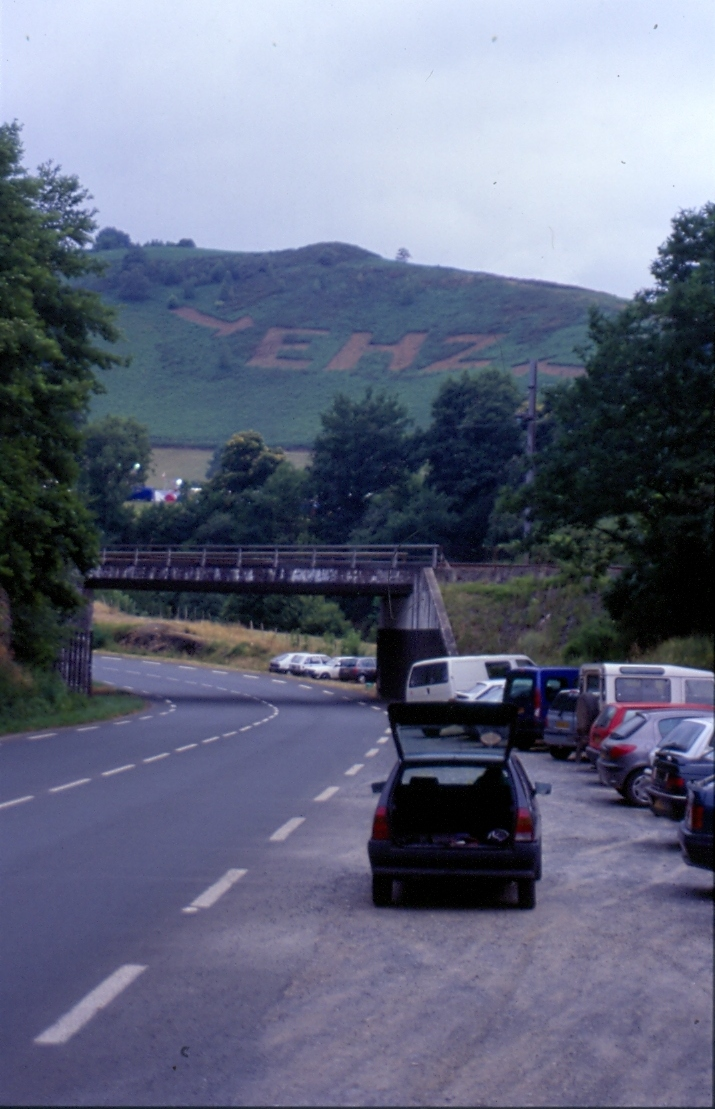 Euskal Herria Zuzenean festibala, 2001ean (Arrosa). Urte honetan sortu zen bertan Arrosa Irrati Sarea.